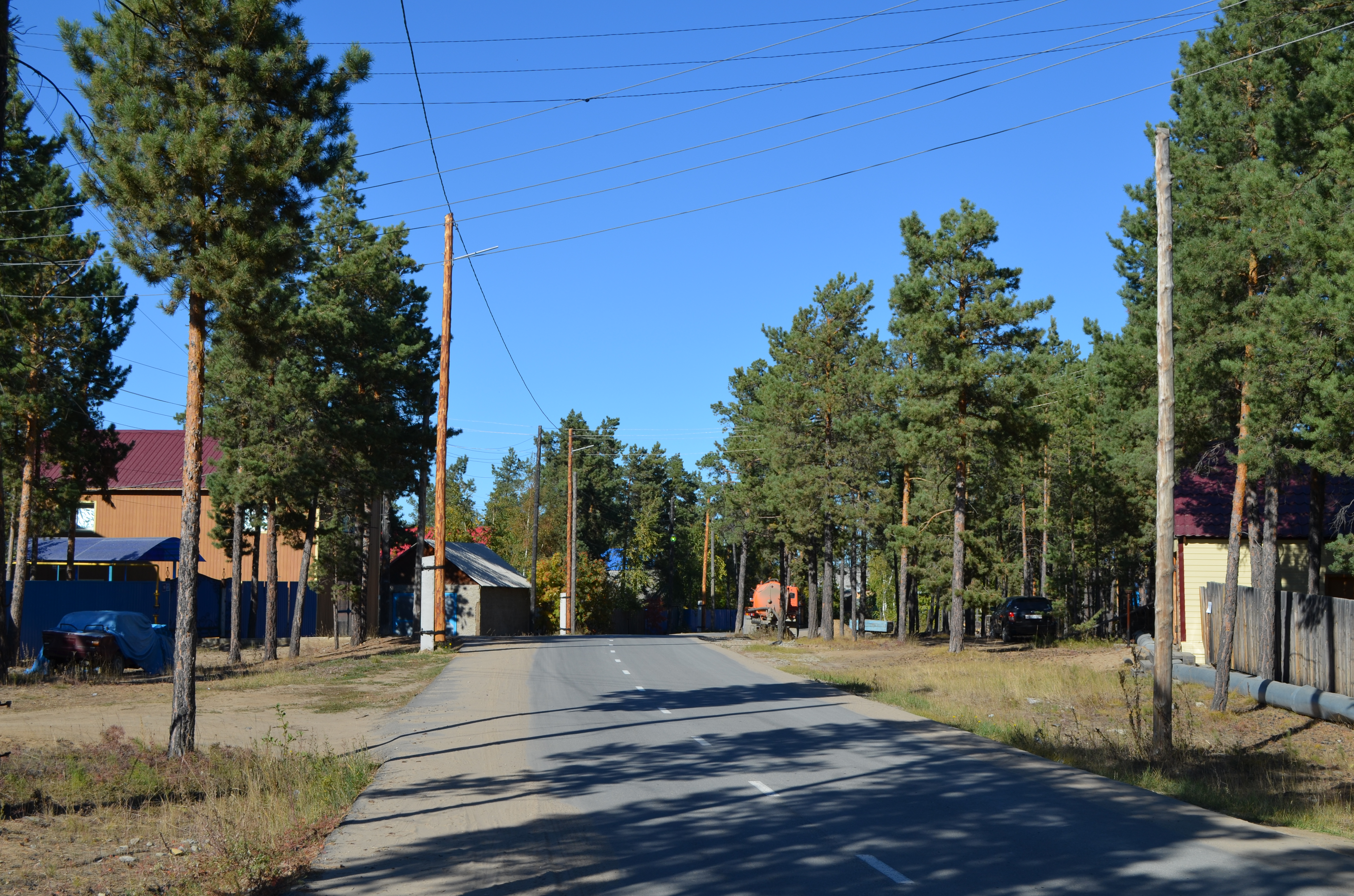 Посёлок Нижний Бестях, Якутия, Мегино-Кангаласский район. Микрорайон "Нефтебаза", улица Нефтяников